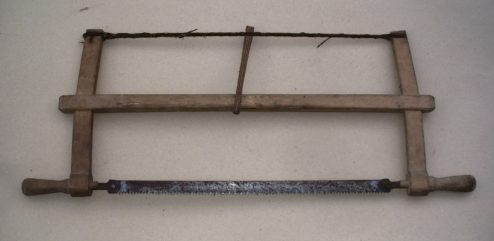 Лучковая пила